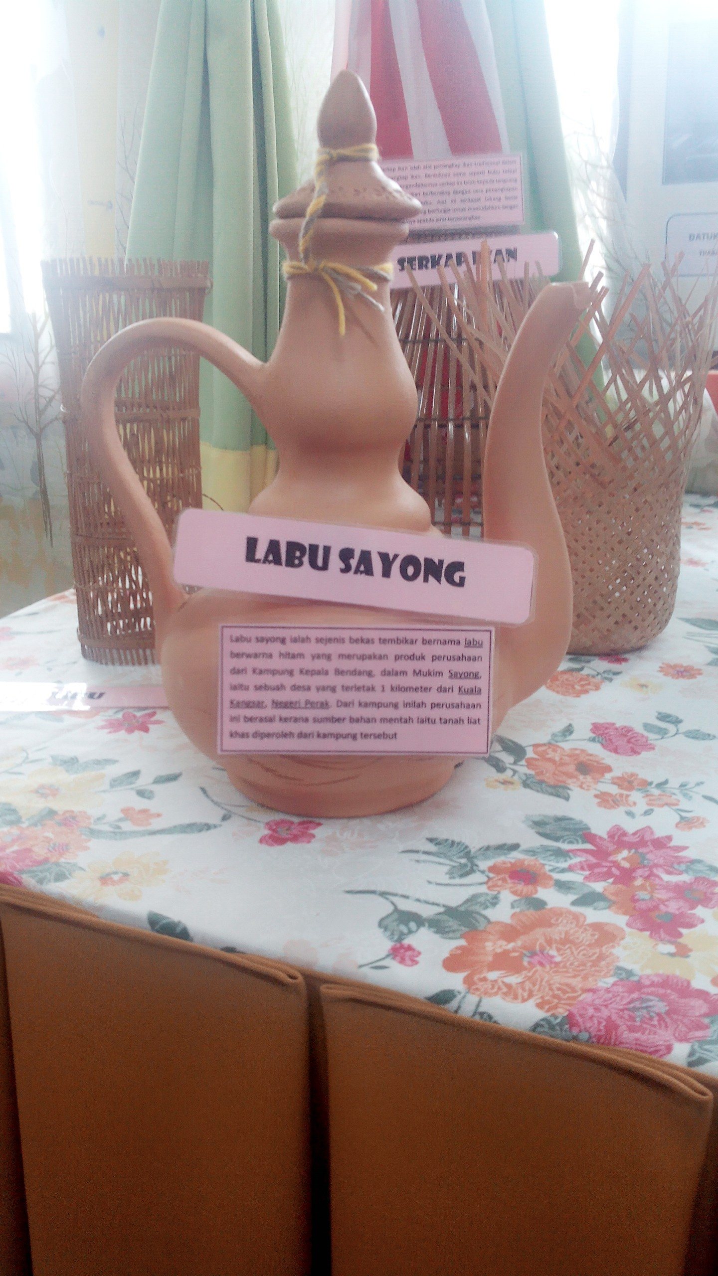 labu sayong